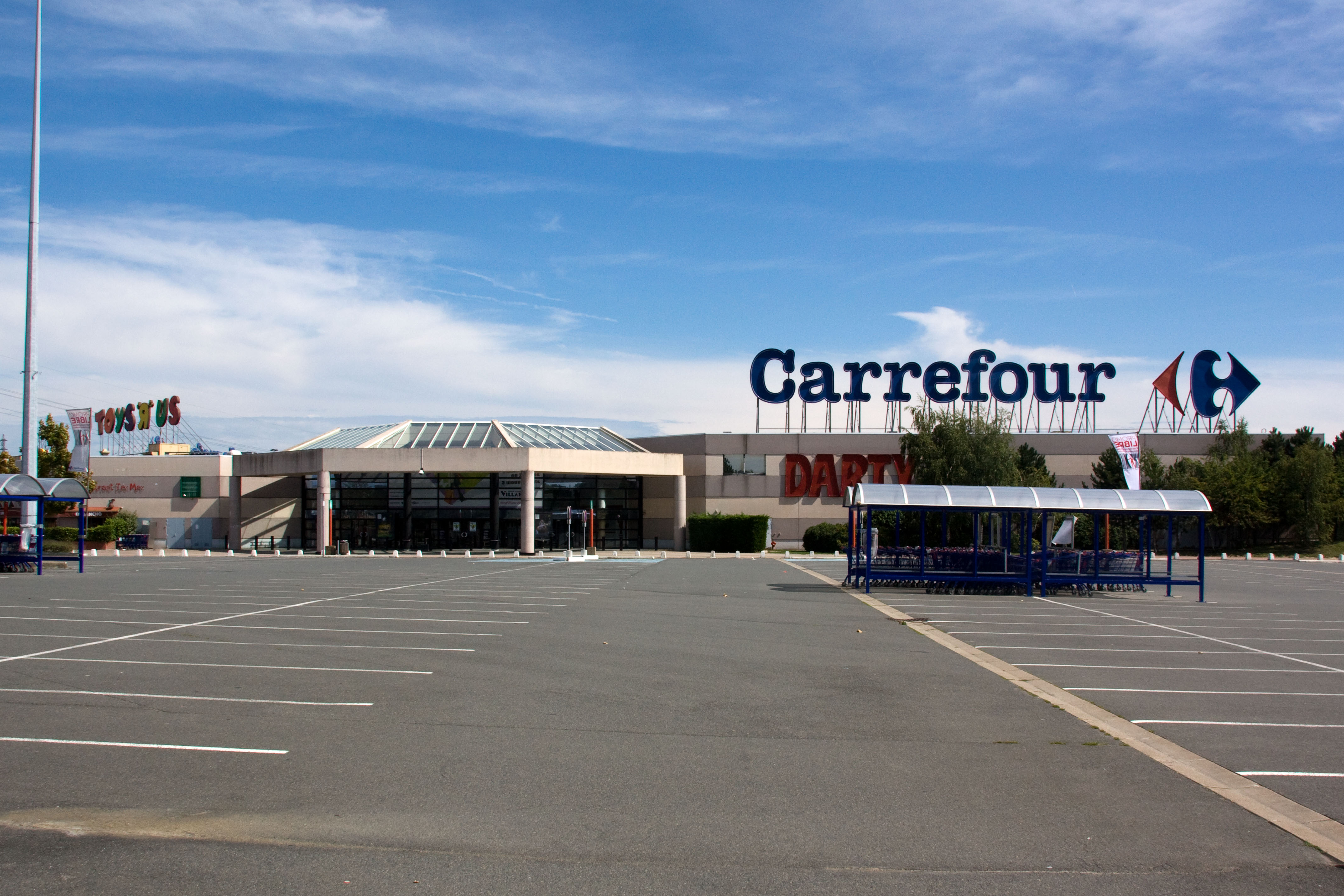 Le centre commercial Villabé A6, Villabé, Essonne, France